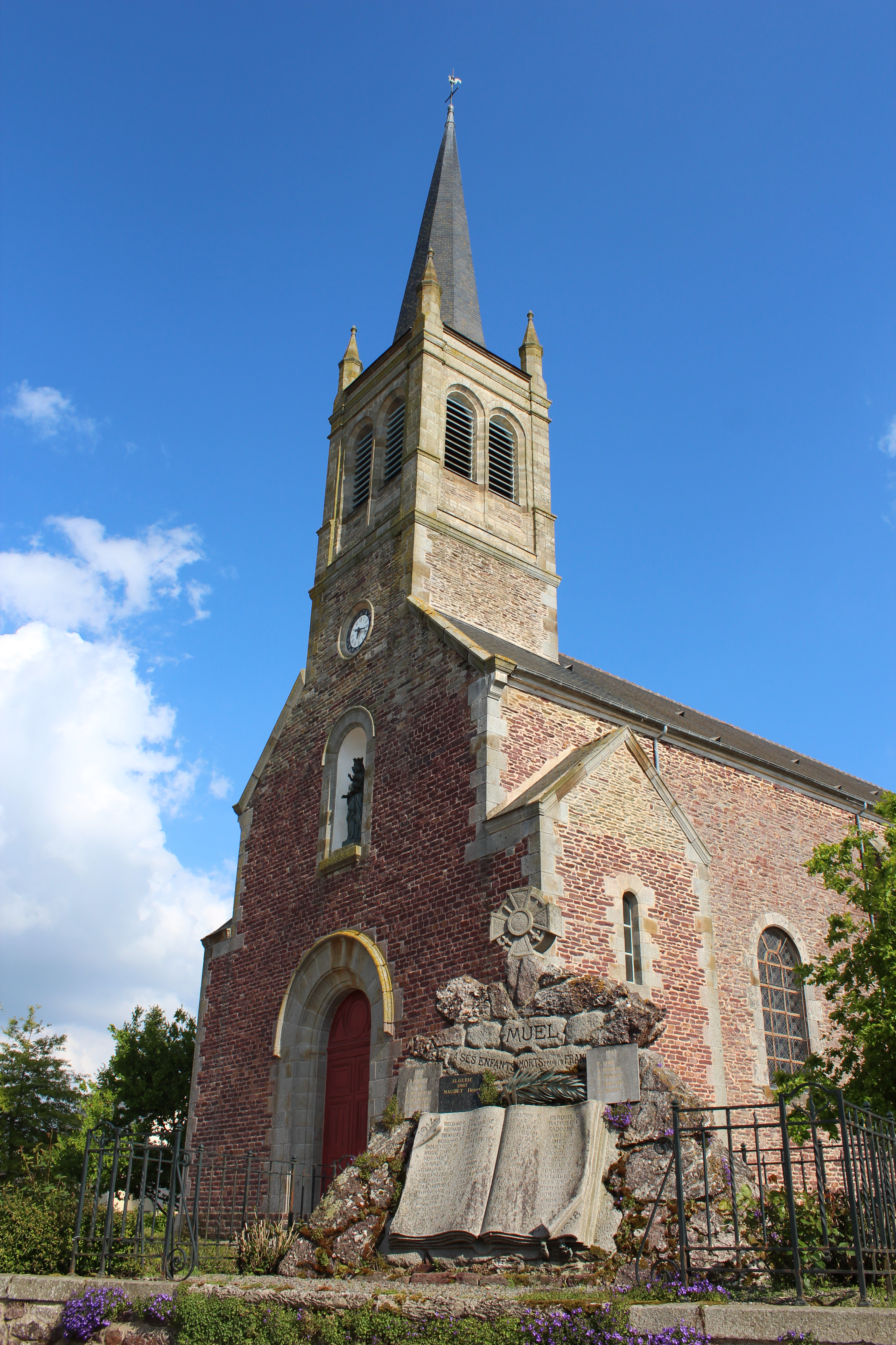 Église de Muel (Ille-et-Vilaine).